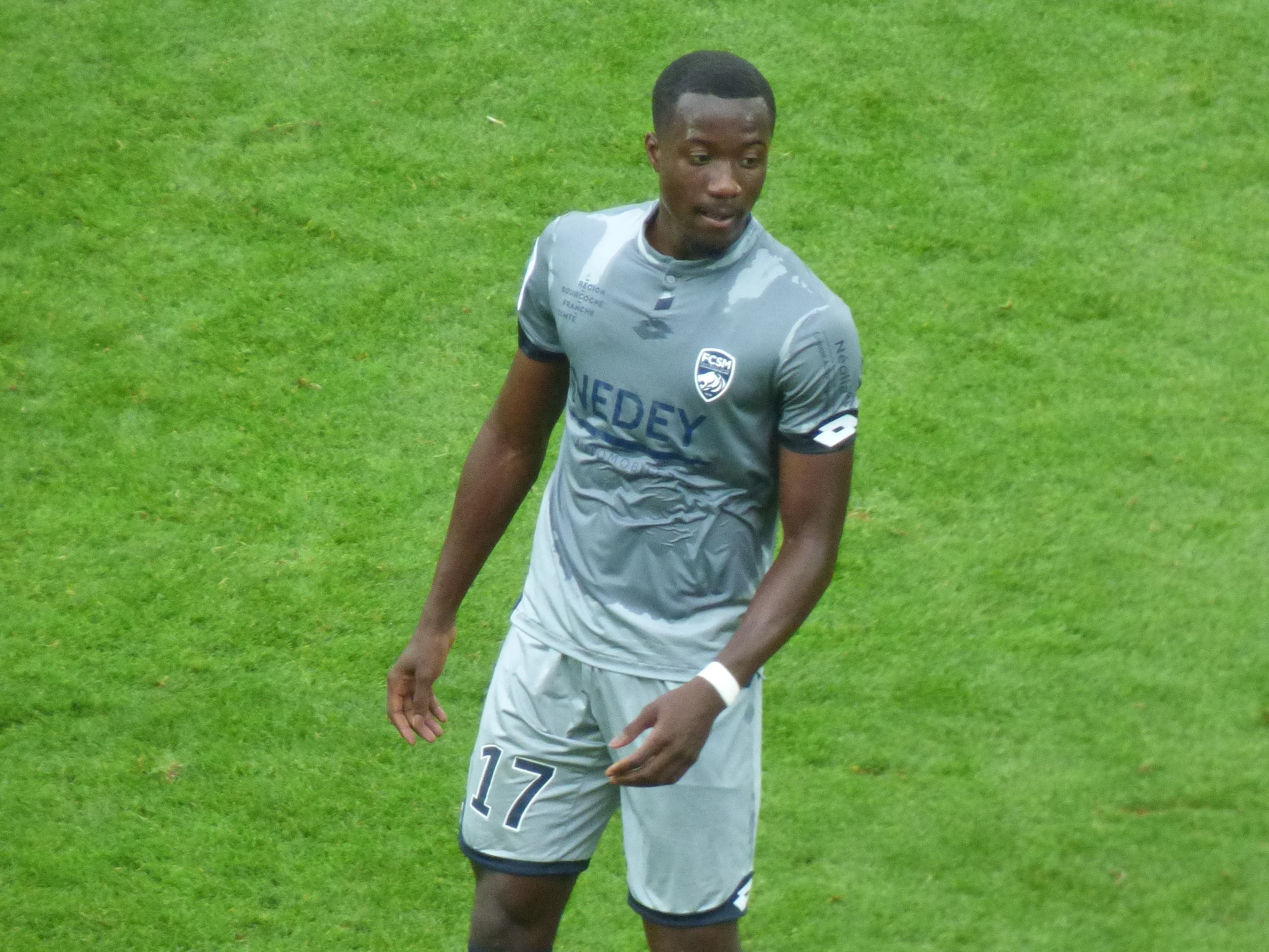 Elisha Owusu lors du match Lens / Sochaux, comptant pour la septième journée du championnat de France de football de Ligue 2, le 15 septembre 2018.